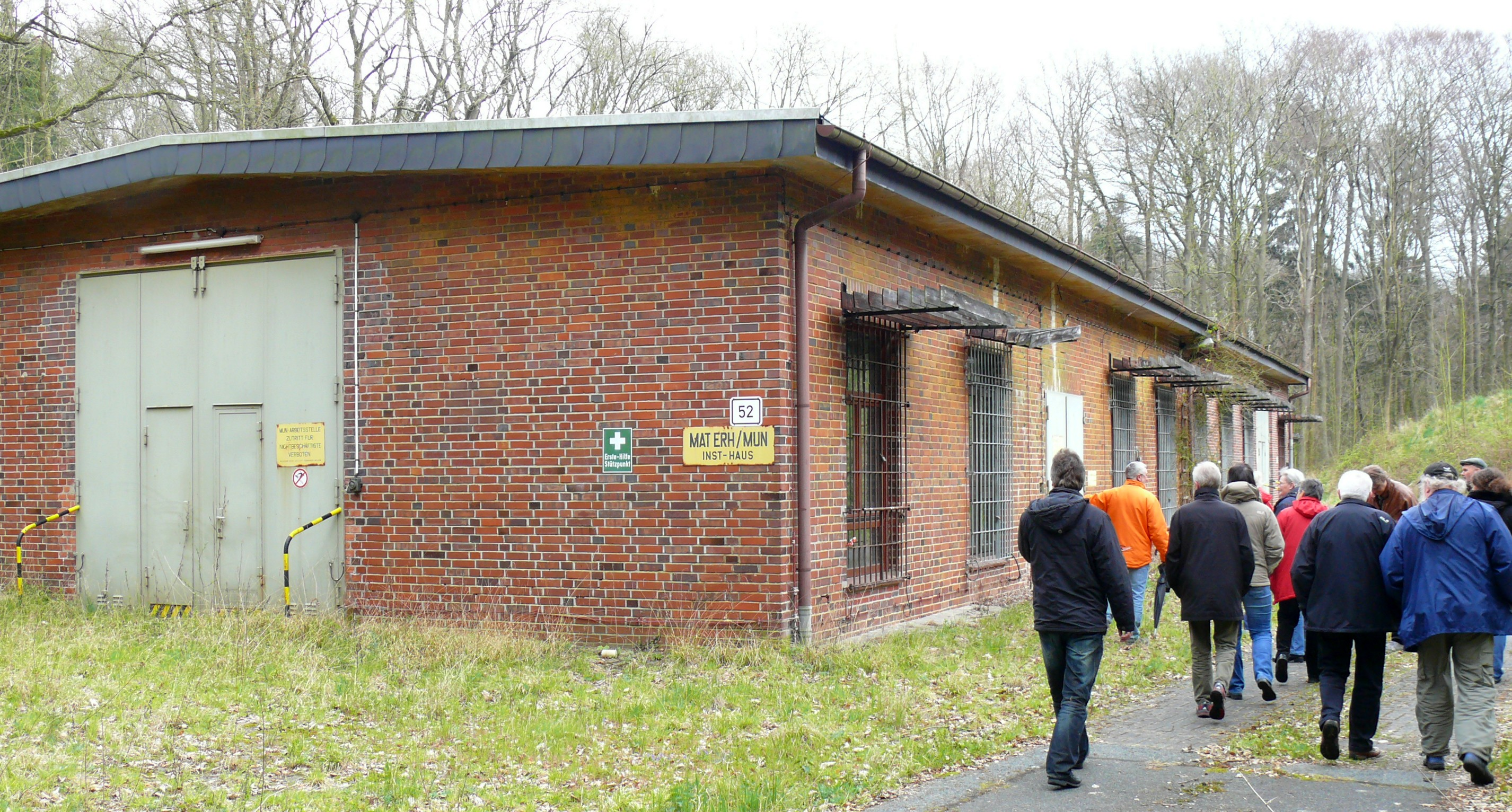 ehemaliges INST-Haus (=Instandsetzungshaus) in der MUNA Lübberstedt - rechts am Rand ein hoher Schutzwall, nach dem 2. Weltkrieg von der Bundeswehr neu erbaut als Lagerhalle für Munition